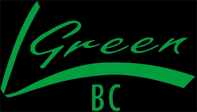 Logo officiel Green Line pour les clarinettes et hautbois de la marque Buffet CramponUnknown